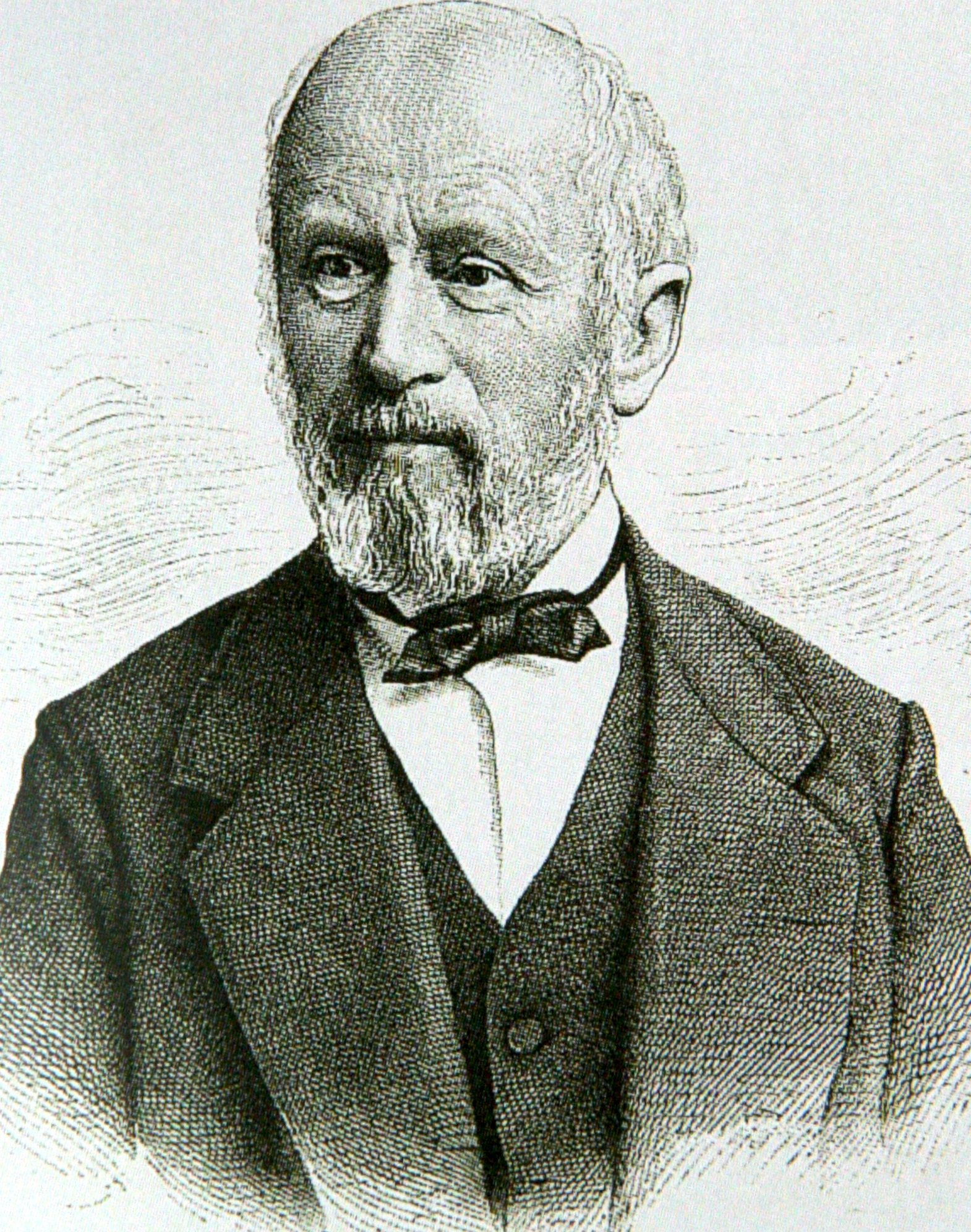 Placi Condrau, Holzstich